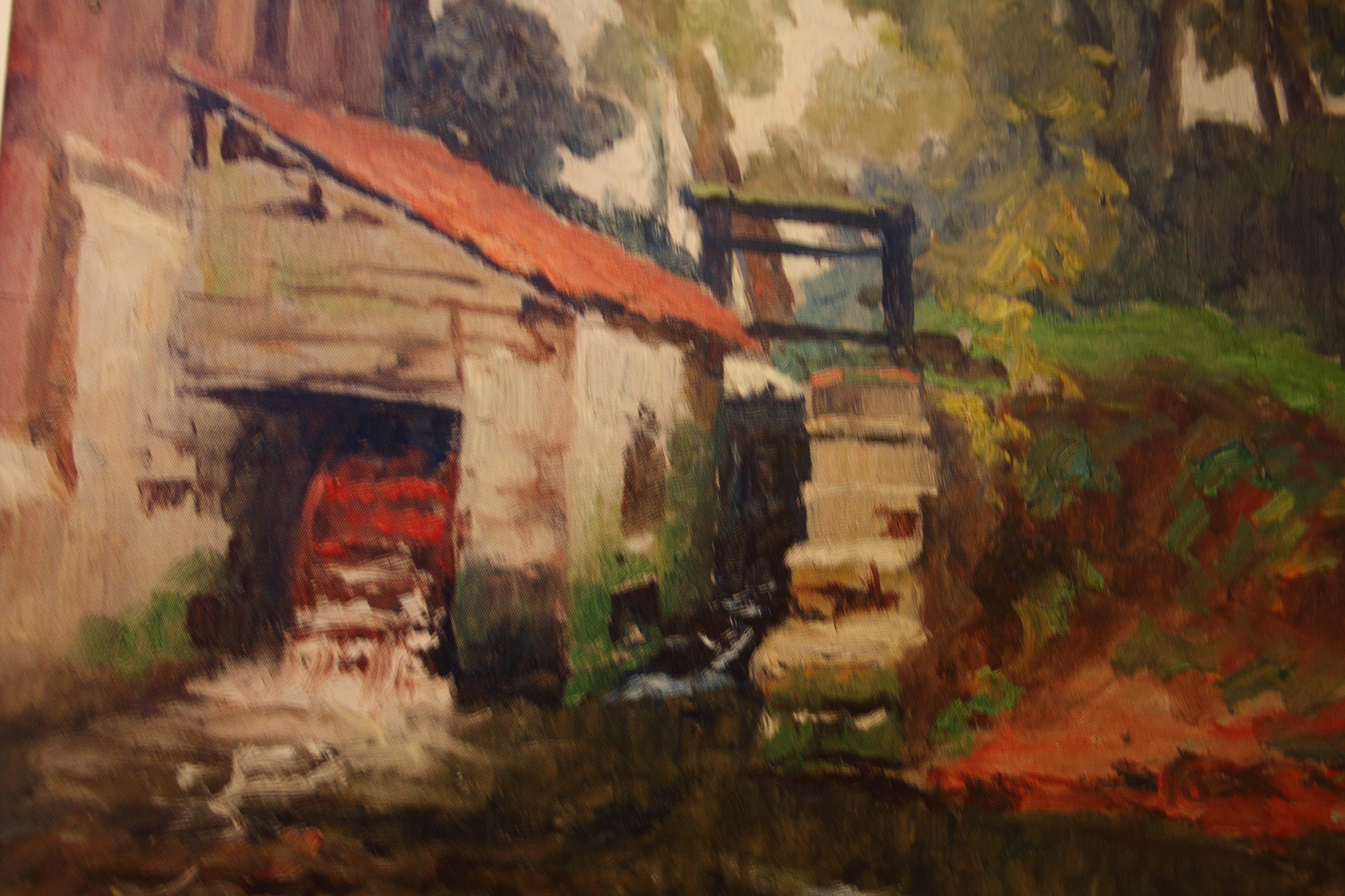 Boembekemolen, Brakel, Raymond Verstraeten, olie op paneel